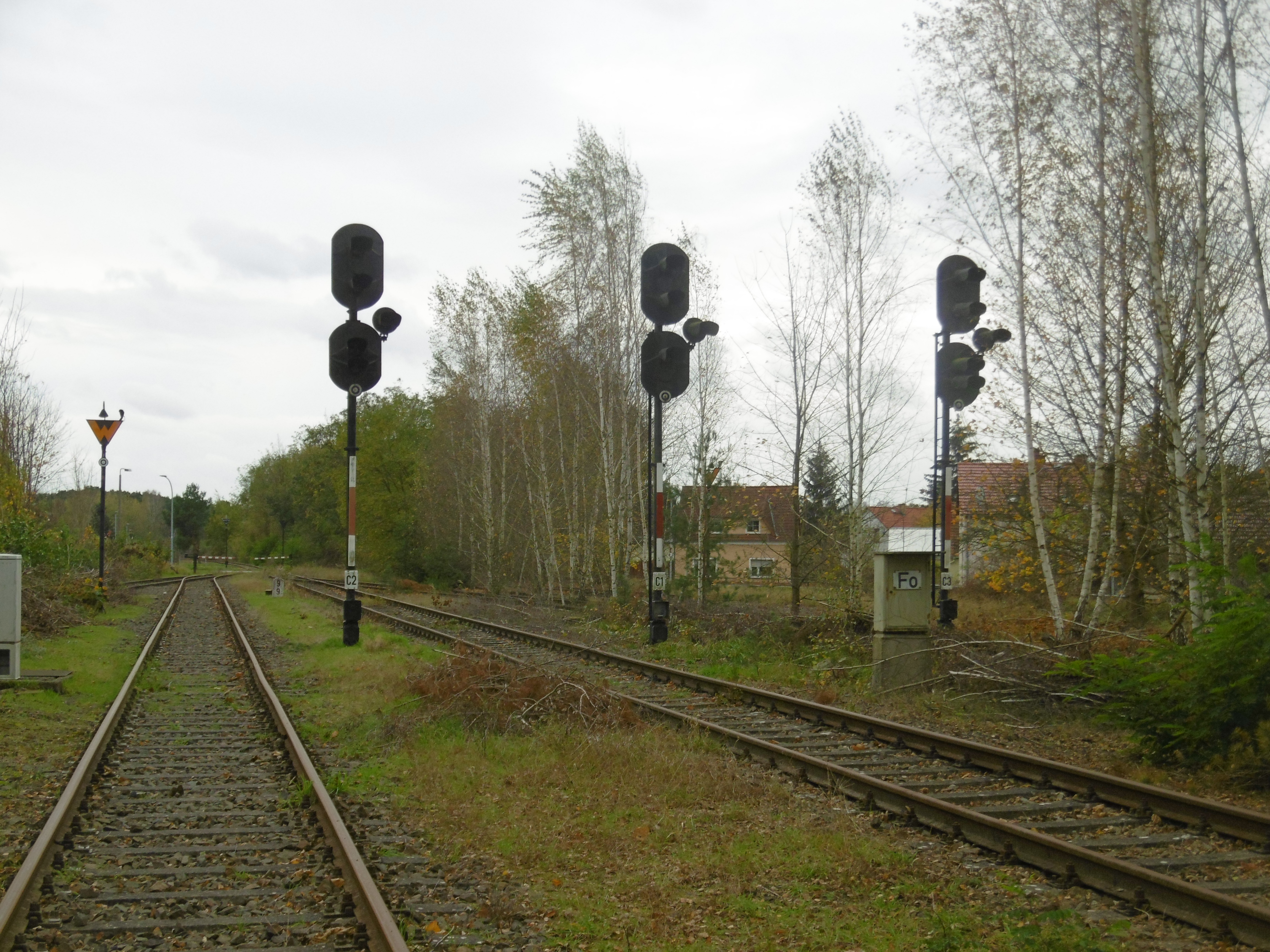 Ausfahrtsignale Bahnhof Sperenberg mit EZMG